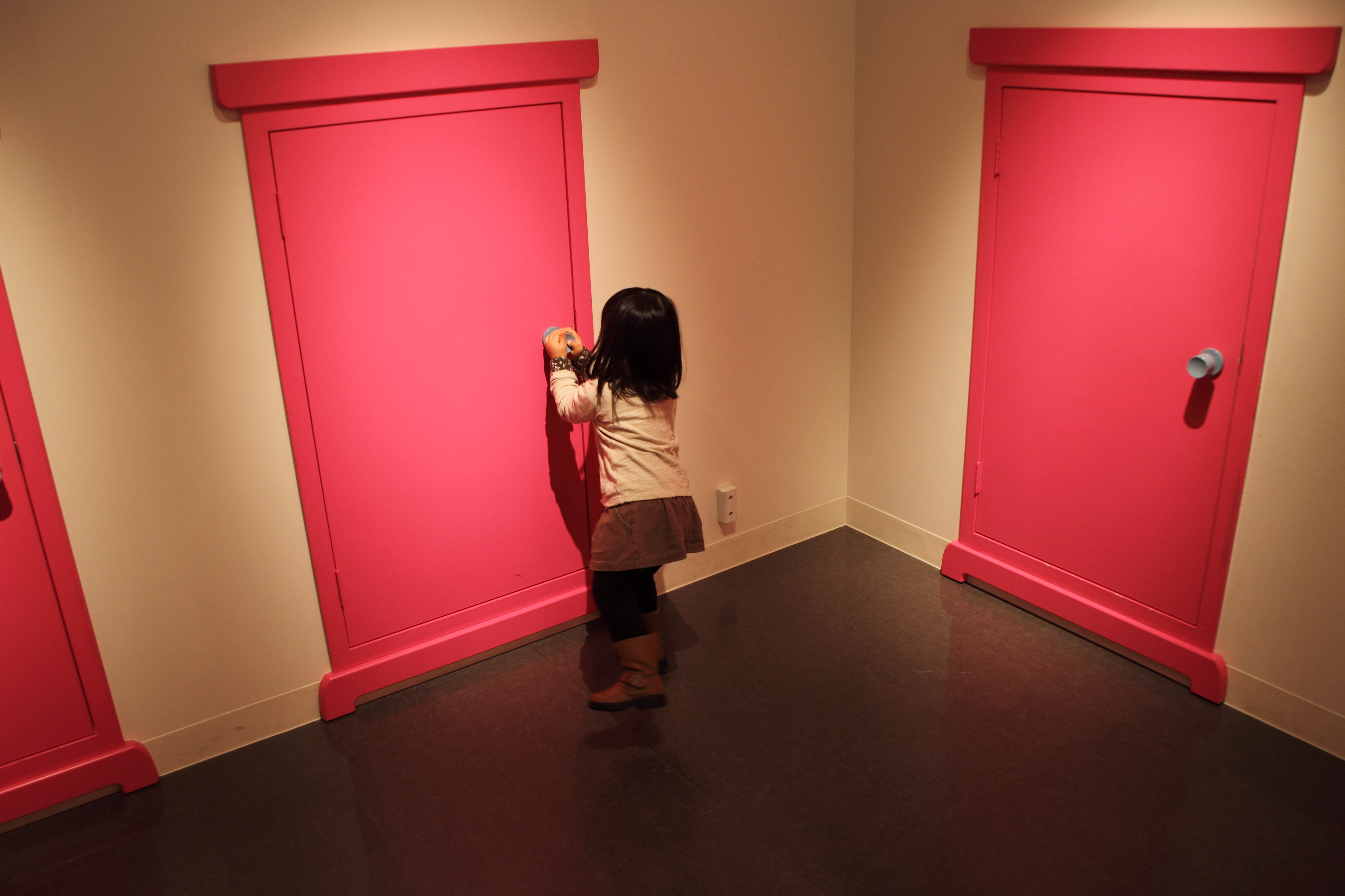 My daughter. どこでもドアを開ける櫻子さん。 ドラえもん・わくわくスカイパーク。 （櫻子さん、3歳3ヶ月）